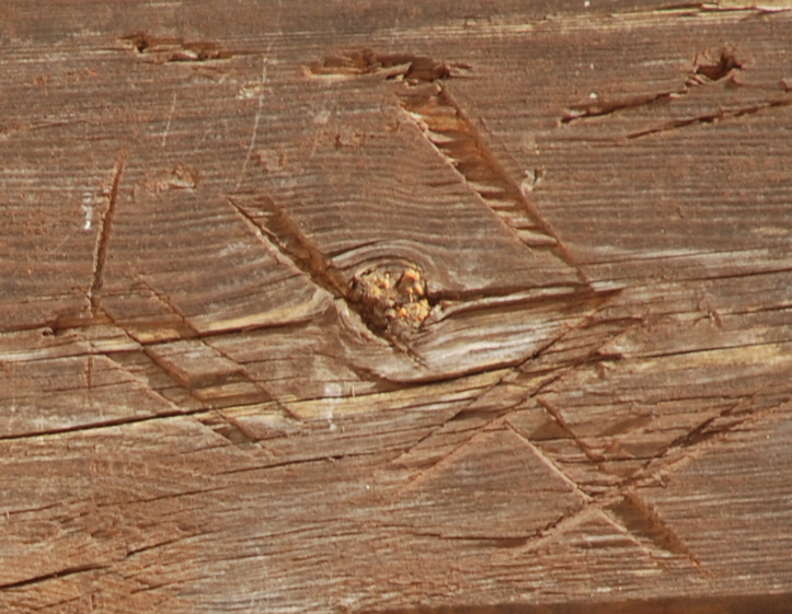 Marca de carpintero medieval. Iglesia de San Nicolás. Puebla de Valles (Guadalajara) España.